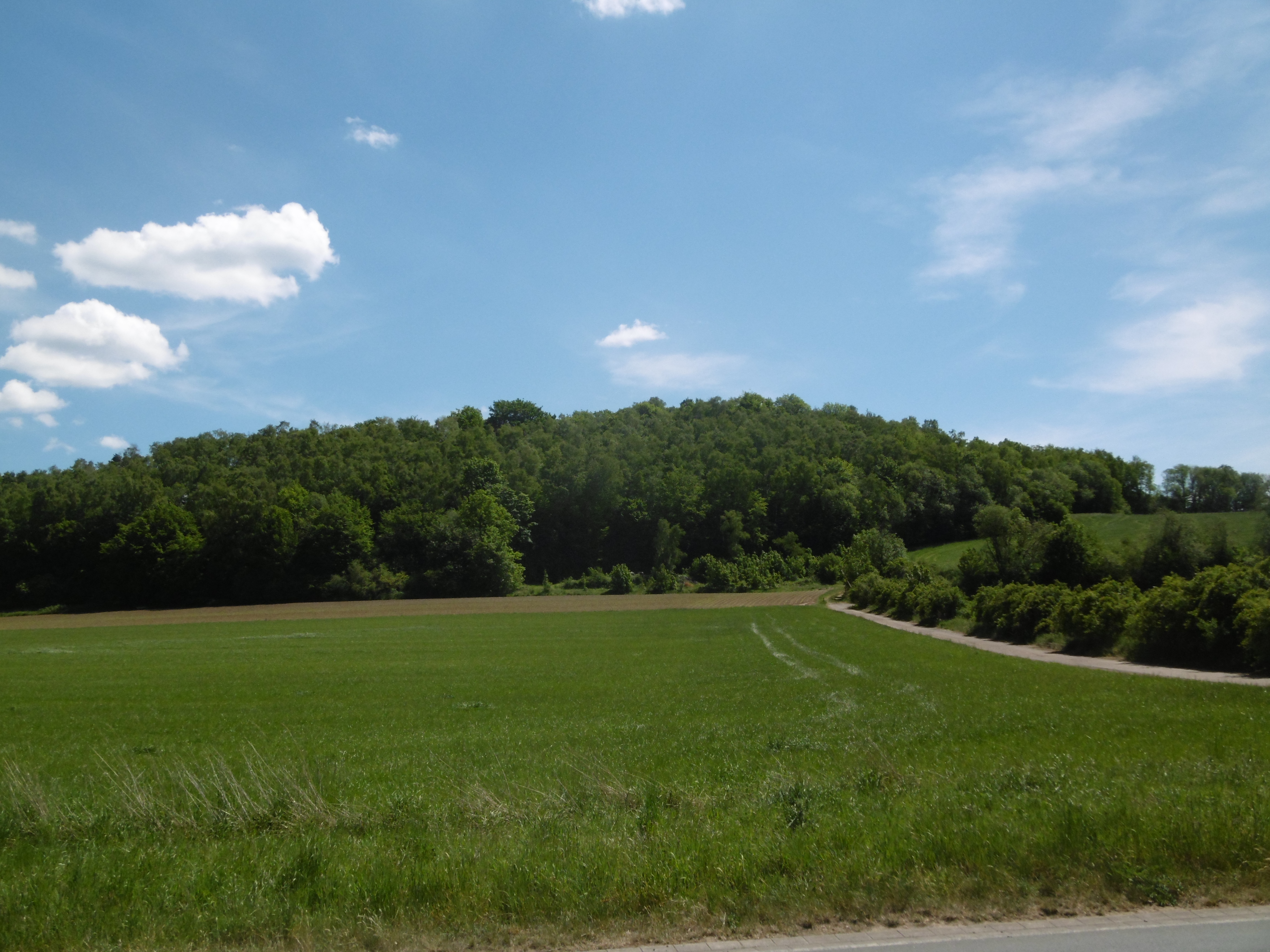 Wald gehört zum Naturschutzgebiet Breloh; Blick von Norden.​